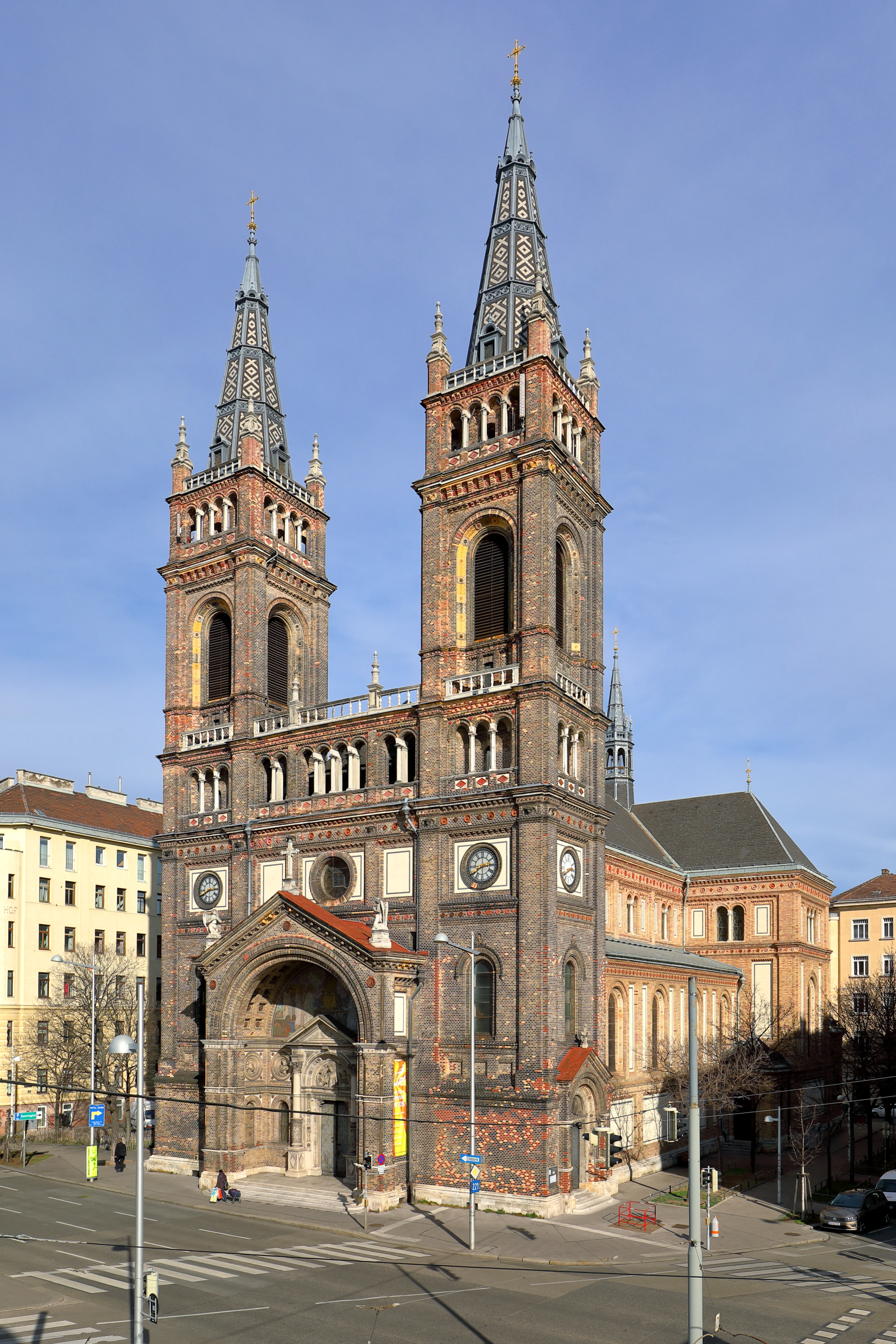 Westsüdwestansicht der Pfarrkirche „Zum hl. Franziskus Seraphikus“ in Breitenfeld, ein Bezirksteil des 8. Wiener Gemeindebezirkes Josefstadt.1840 wurde zwecks Bau einer Kirche ein Kirchenbauverein gegründet. Nach einer Ausschreibung im Jahr 1852 kam es 1886 abermals zu einer Ausschreibung. Als Sieger ging der Architekt Alexander Wielemans hervor. Erst nach weiteren 8 Jahren kam es endlich 1894 zur Grundsteinlegung. Vier Jahre später, am 18. Juni 1898, wurde die im Stil der italienischen Frührenaissance errichtete Kirche feierlich geweiht.